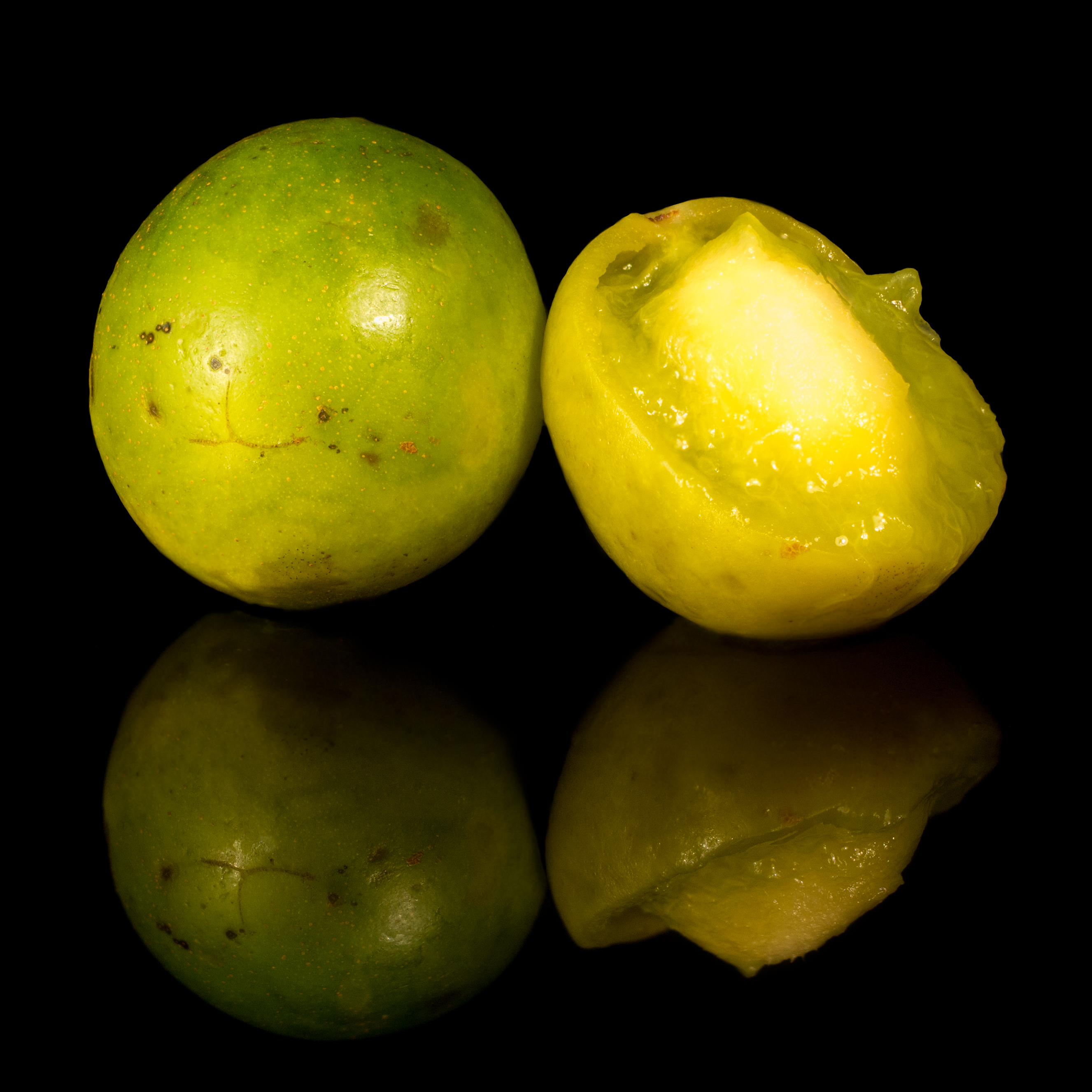 Umbu fruto aberto e fechado em fundo preto